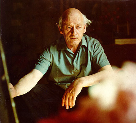 Der Künstler beim Blumenmalen im Wohnzimmer seines Hauses.